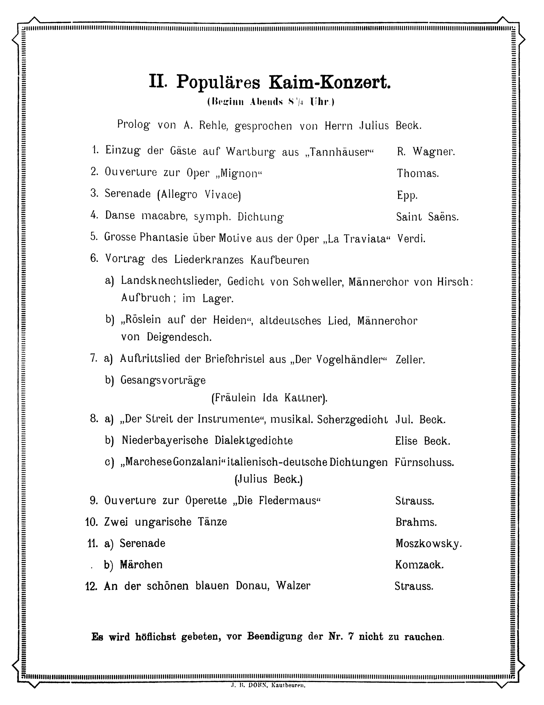 Blatt 2 des Programms (populäres Kaim-Konzert) anlässlich der Stadtsaaleröffnung Kaufbeuren, Mitwirkende neben dem großen Kaim-Orchester: Schriftsteller Julius Beck aus München, Hofkapellsängerin Marie Henke, Ida Kattner v. Gärtnerplatztheater München und des Kaufbeurer Liederkranzes